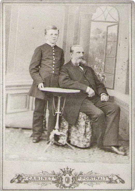 Беларуская (тарашкевіца): Партрэт Фэрдынанда Рушчыца (Ferdynand Ruščyc) з бацькам Эдвардам Рушчыцам